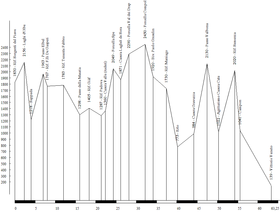 Profilo altimetrico Alta Via n.6